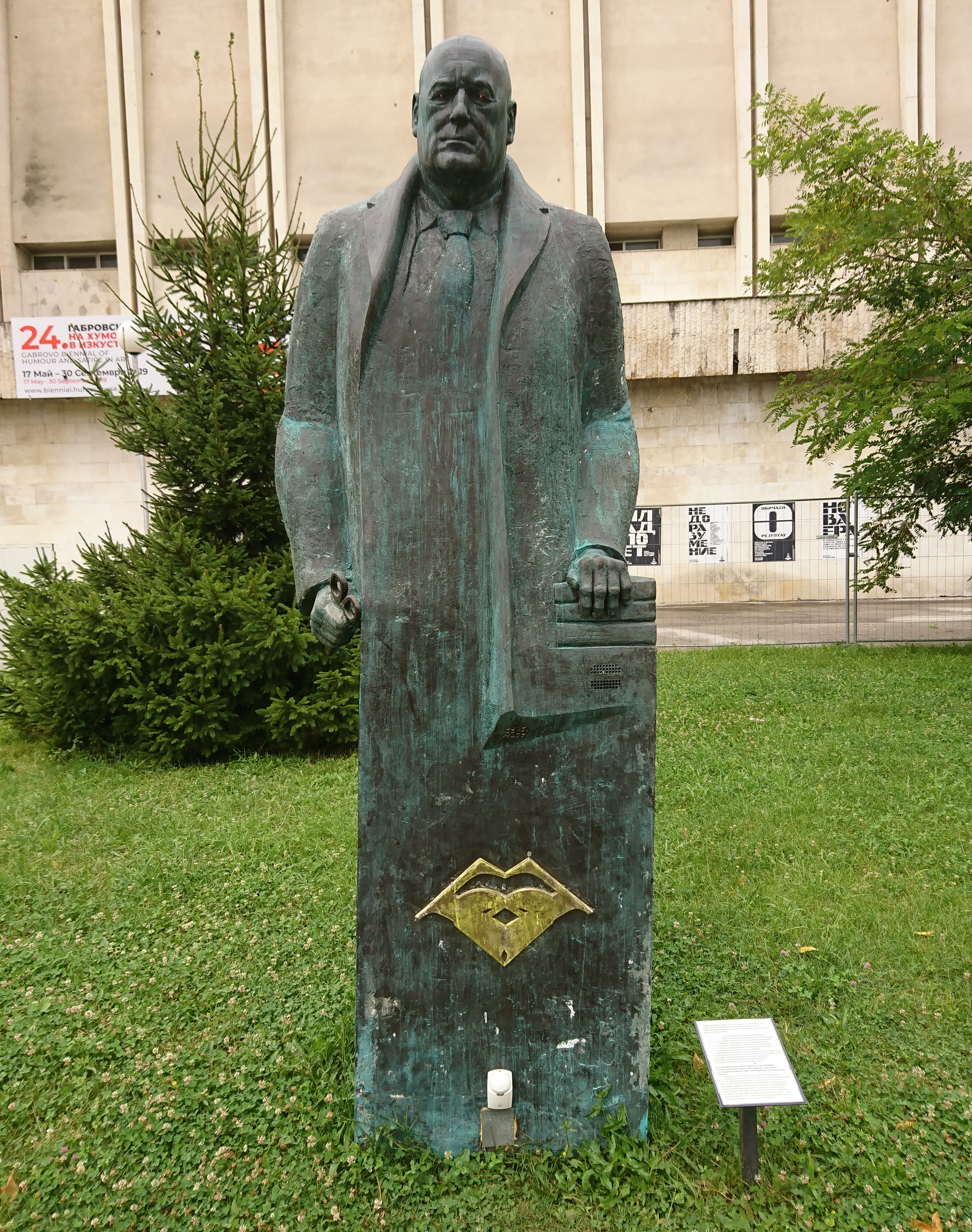 Скулптура на съвременен политик, изпълнена от полиестерна смола, по подобие на паметника на Ленин. Скулптор - Андрей Врабчев (2016).